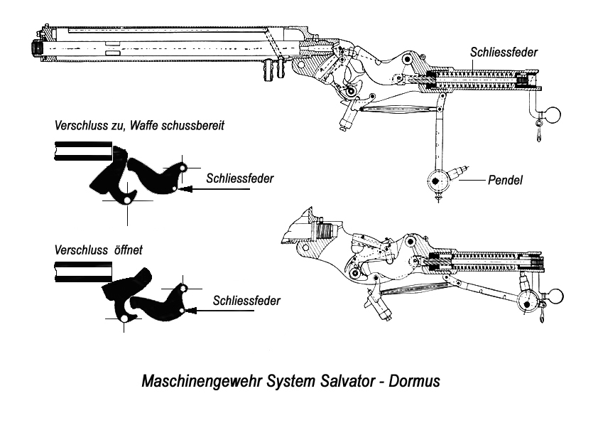 Bearbeitung einer zeitgenössischen Schnittzeichnung datiert 1895